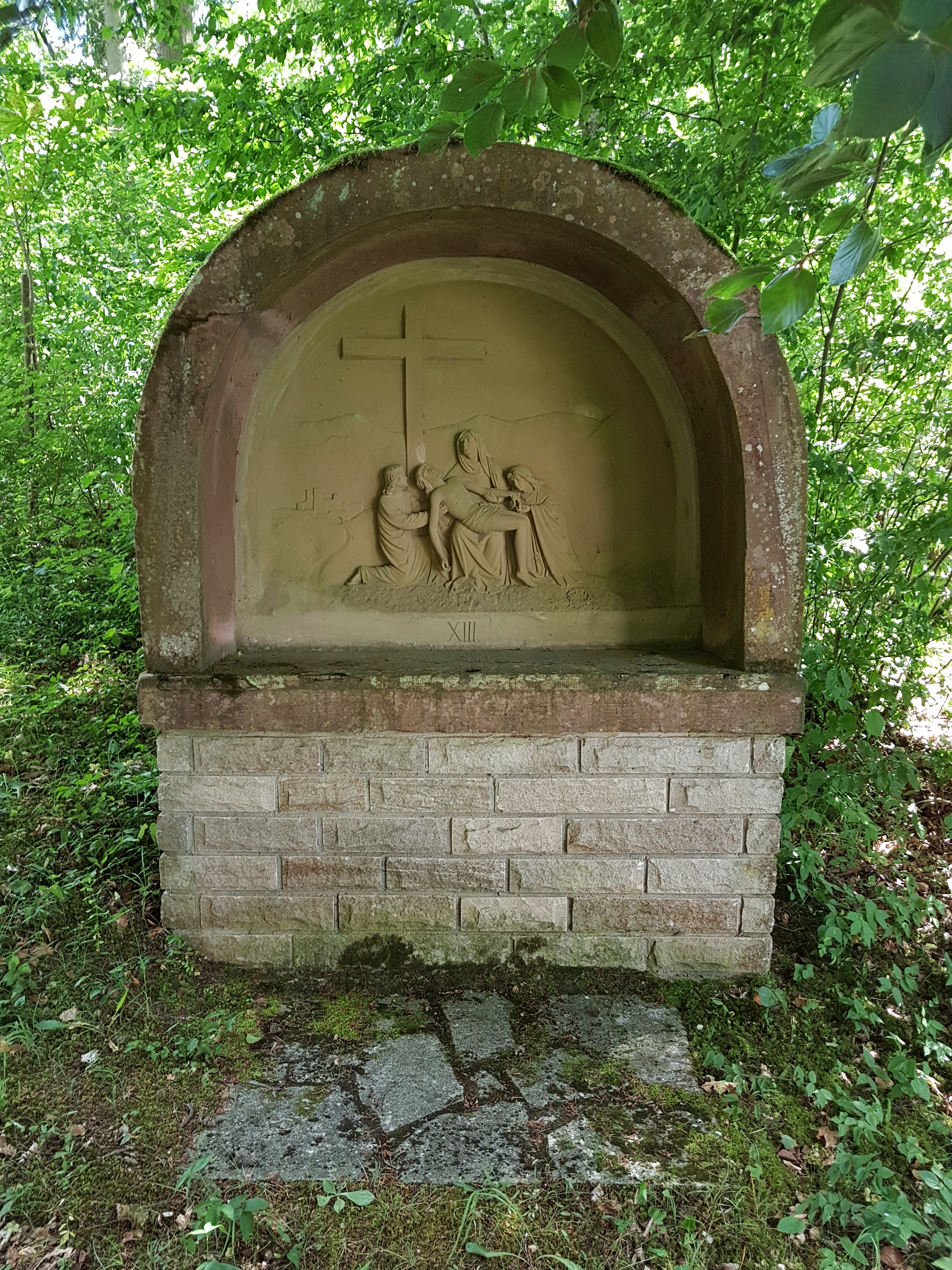 Kreuzweg zur Dittwarer Kreuzkapelle am Kreuzhölzle Bilder hochkant